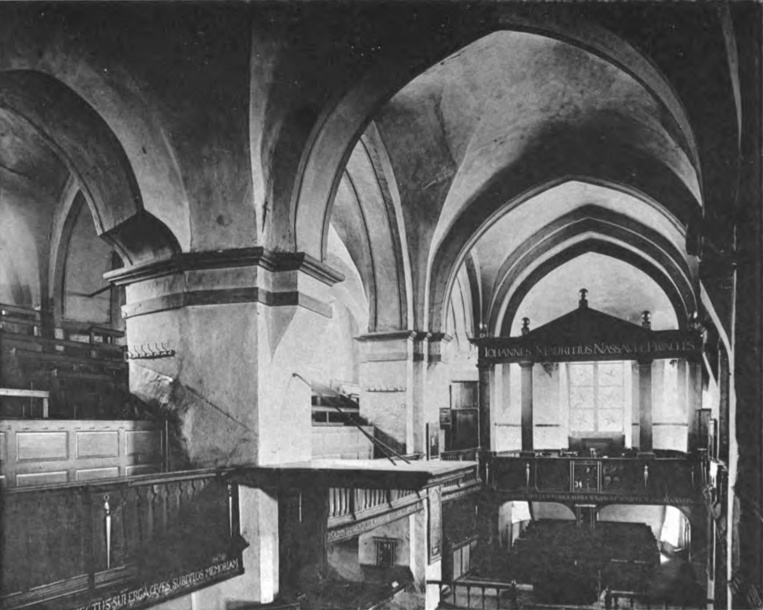 Nikolaikirche in Siegen/Westfalen: Innenansicht mit Blick nach Nordosten. Unten Mitte die Kanzel mit Schalldeckel, rechts der „Fürstenstuhl“. Fotografie von Albert Ludorff, 1897. Erstveröffentlichung 1903